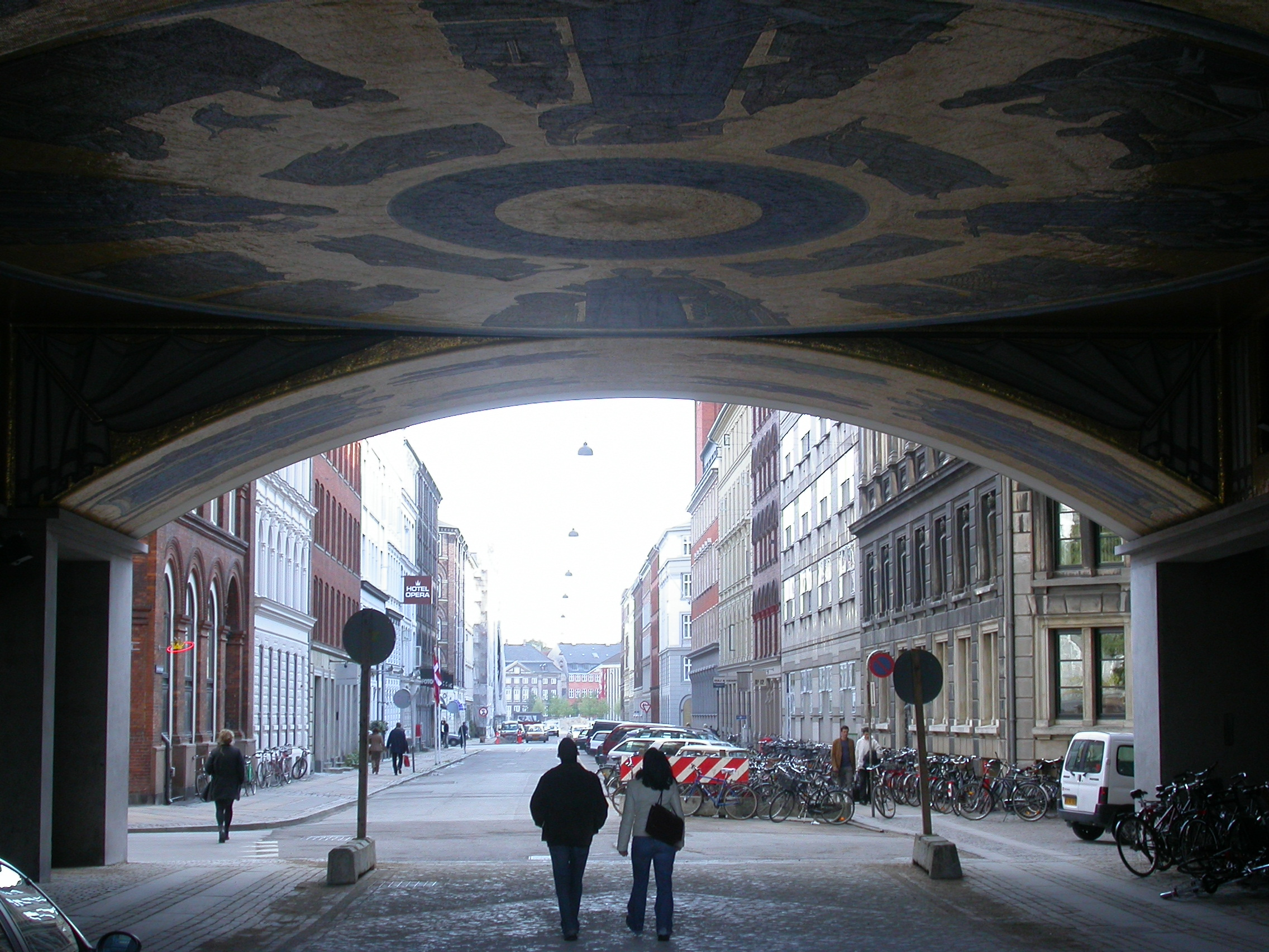 Torgenskjoldsgade seen from the passageway below Stærekassen in Copenhagen, Denmark